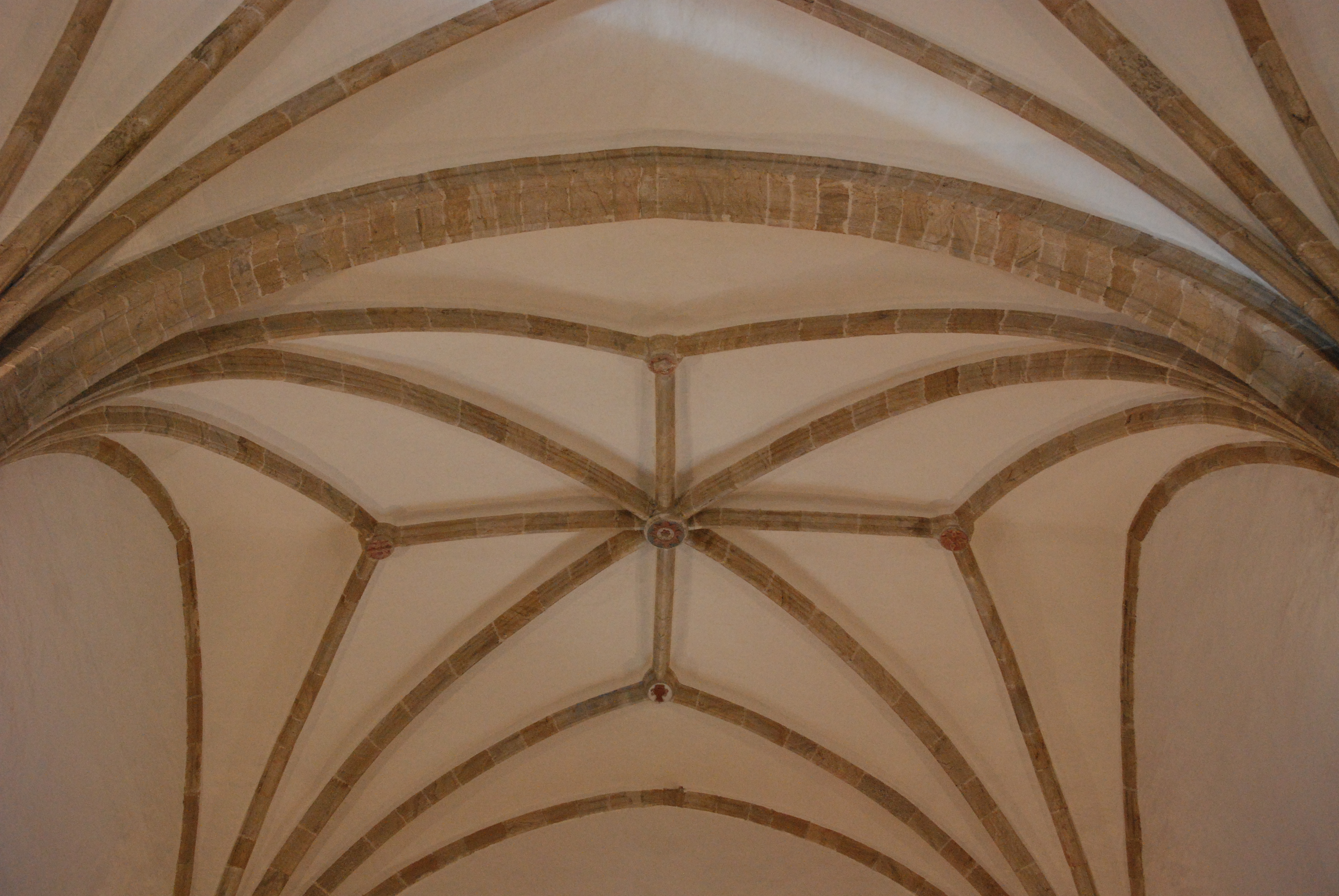 Iglesia de Saucedilla, bóvedas de crucería estrellada, del maestro Sancho de Cabrera (sigl. XVI)